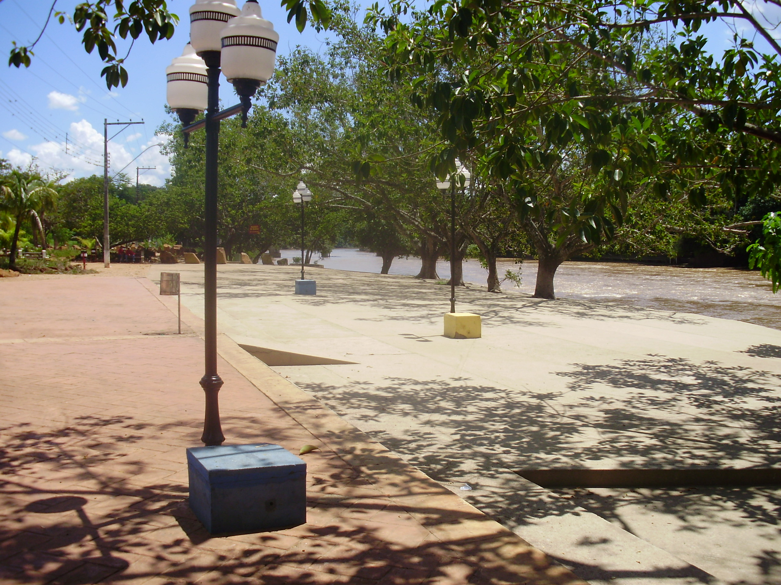 Área dos barcos (praçinha)